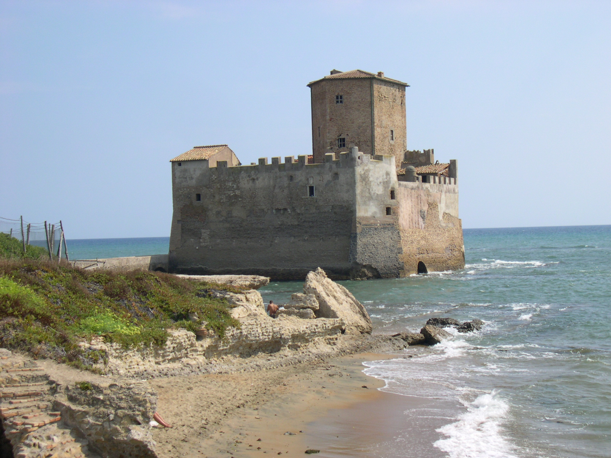 Torre Astura, Nettuno (Roma). Veduta dell'edificio medievale.